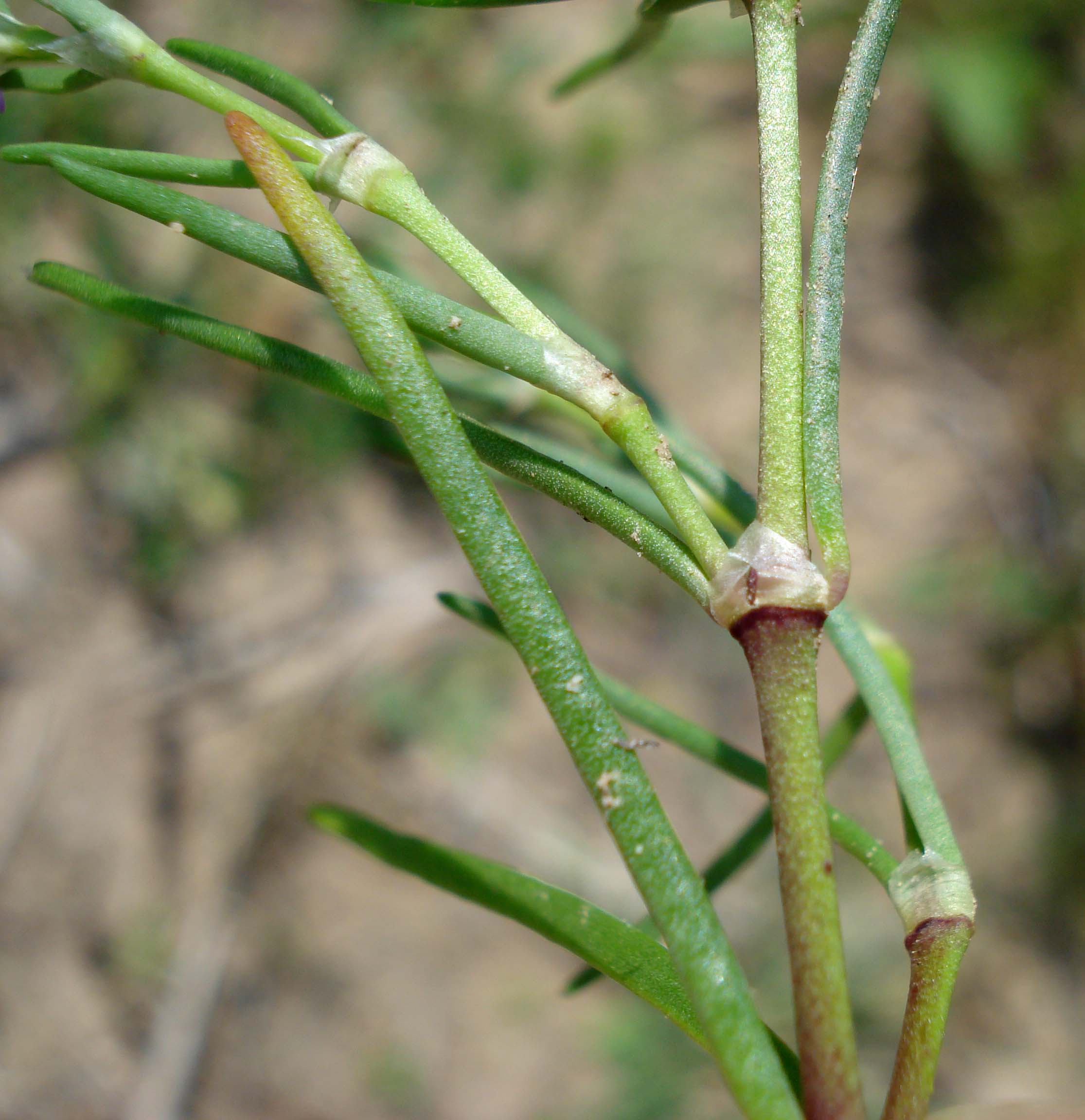 Spergularia salina (Unterfranken, Germany)